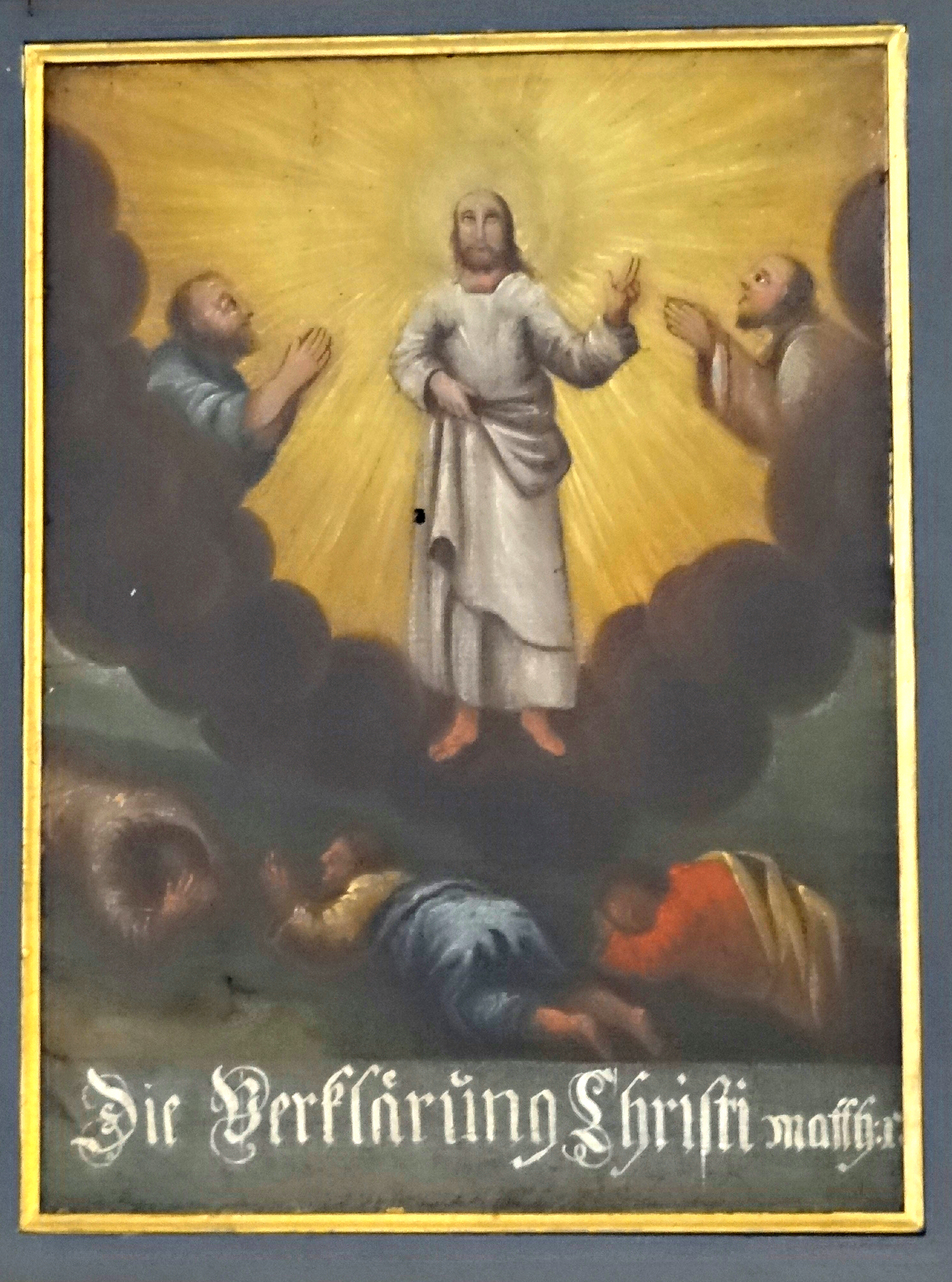 Evangelische Kirche Albach